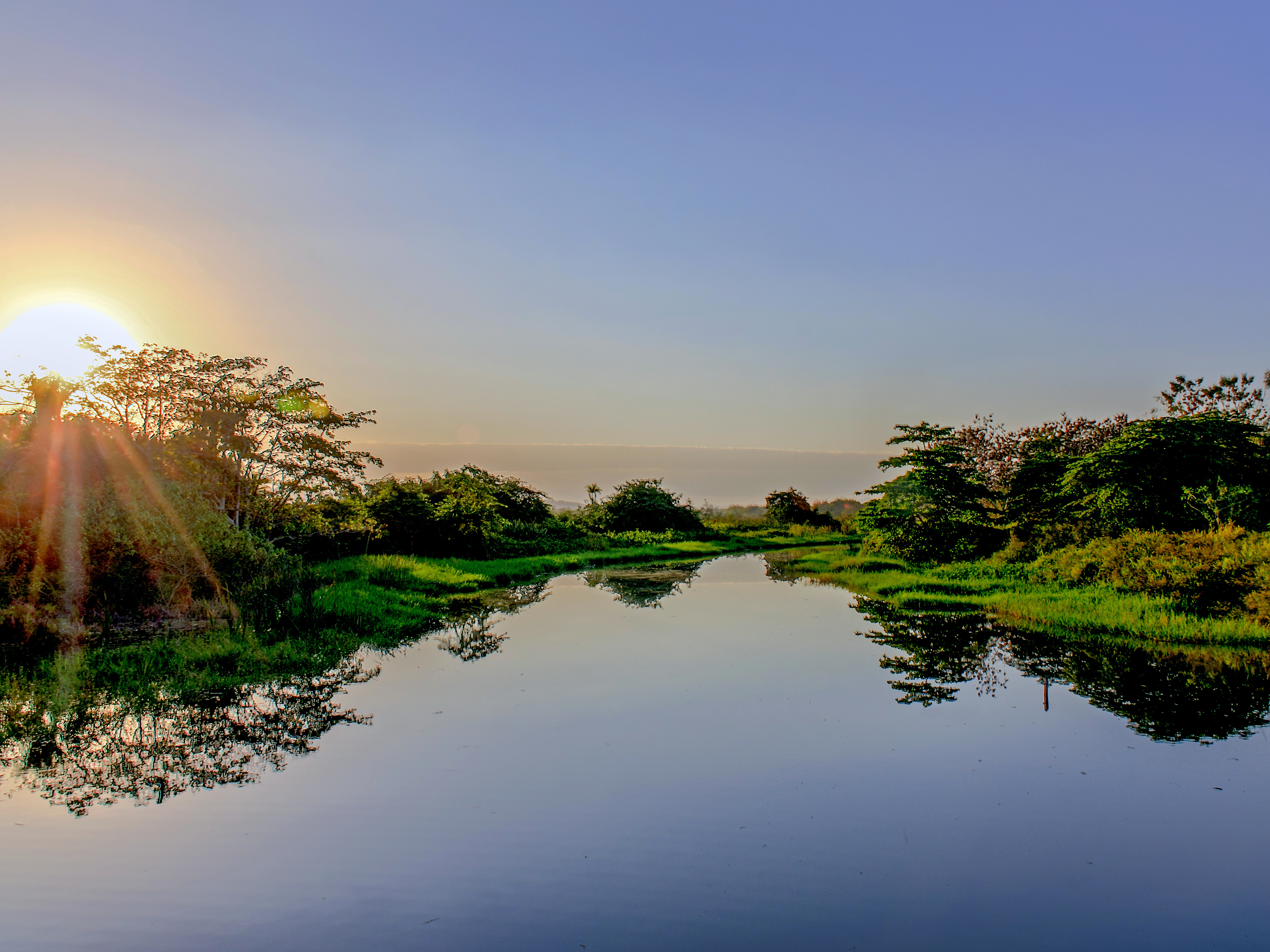 Río Guanajibo